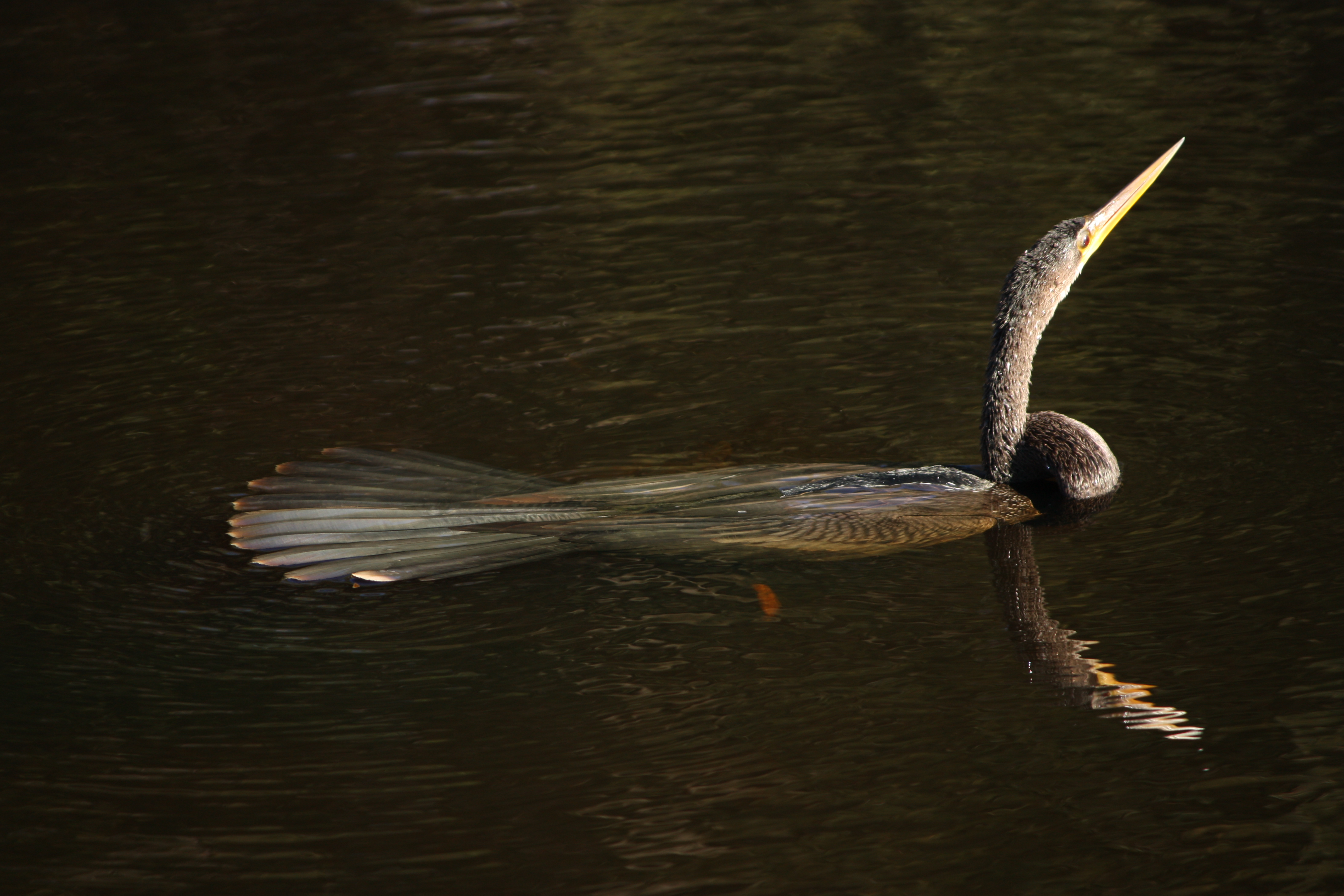 Anhinga anhinga swimming in a pond.